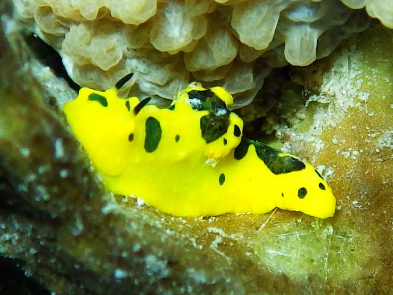 Notodoris gardineri Eliot, 1906 (synonym: Aegires gardineri) juvenil de 10 mm, isla Lizard, Australia